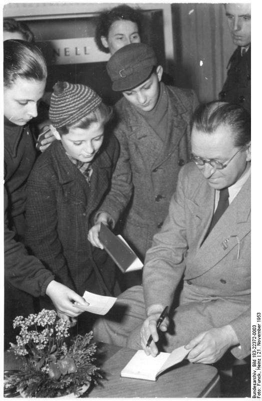 Zentralbild-Funck 21.11.1953 Zum Monat der Deutsch-Sowjetischen Freundschaft Schriftstellerbazar in Berlin. Am 21.11.1953 veranstalteten der Deutsche Schriftstellerverband und die Sektion Literatur der Gesellschaft für Deutsch-Sowjetische Freundschaft im Berolinahaus am Alexanderplatz einen Schriftstellerbazar. Zu Ehren des Monats der Deutsch-Sowjetischen Freundschaft verkauften bekannte deutsche Schriftsteller Bücher ihrer sowjetischen Kollegen. UBz: Der Schriftsteller Peter Nell gibt Schülern der 9. Schule Prenzlauer Berg, die mit ihrem Lehrer den Bazar besuchten, Autogramme.